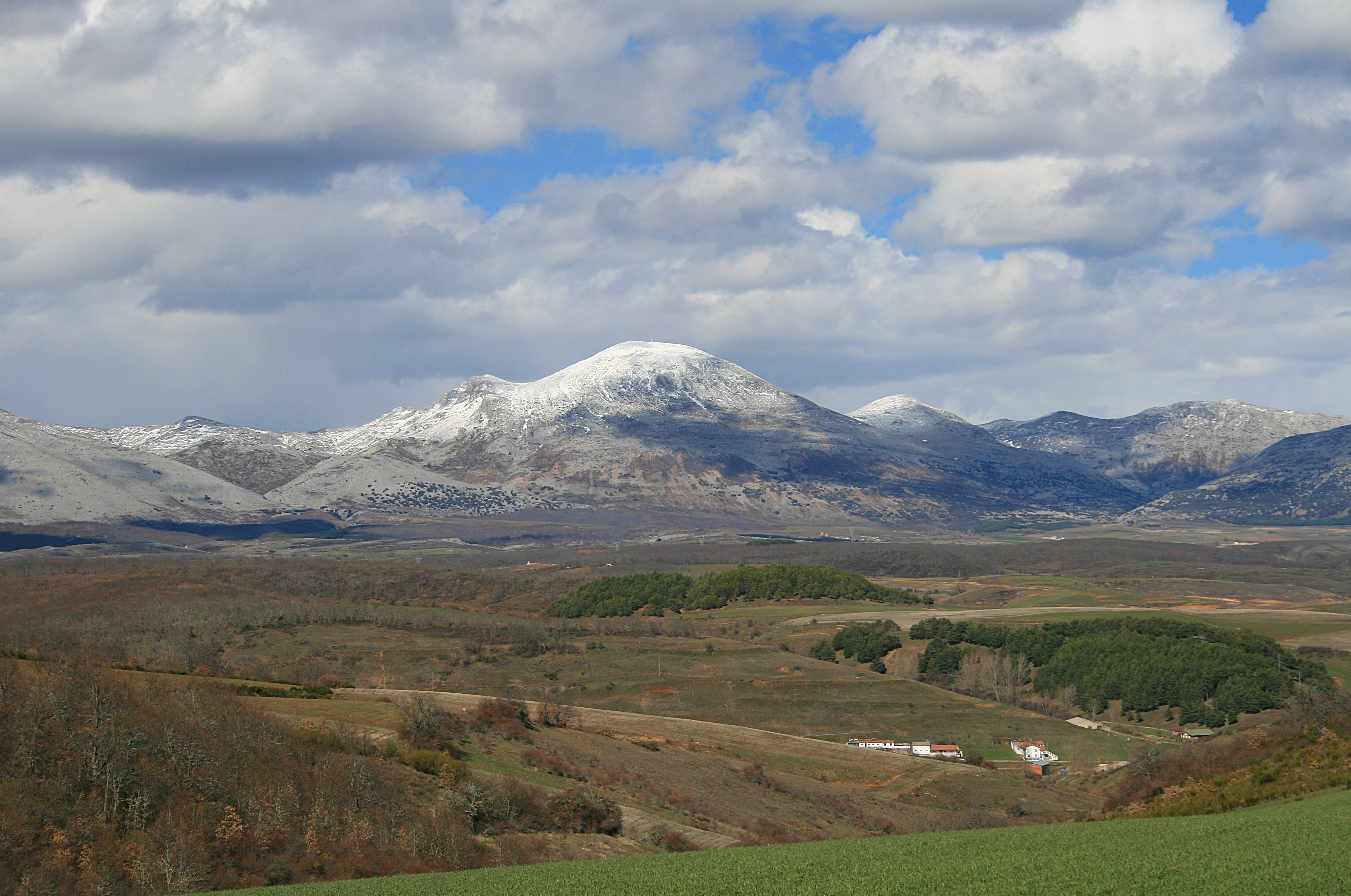 Vista sur de la Sierra del Brezo, en la montaña Palentina desde Respenda de la Peña. En primer término Peña Redonda (Palencia, Castilla y León).